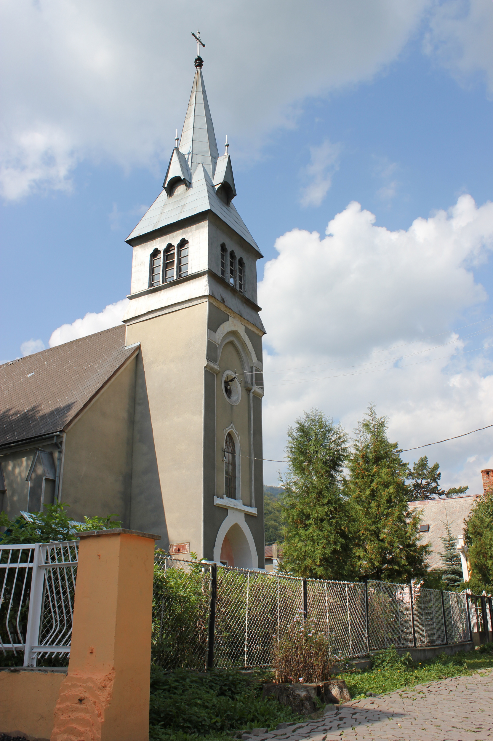 Kirche in Ust-Tschorna, Transkarpatien, Ukraine.